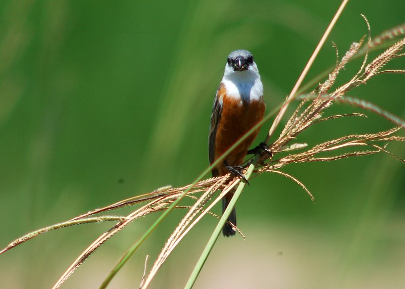 Marsh Seedeater (Sporophila palustris) Camino de Cambá Trapo, Pellegrini, Iberá, provincia de Corrientes, Argentina